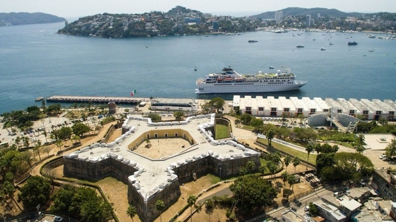 foto aerea fuerte de san diego en acapulco